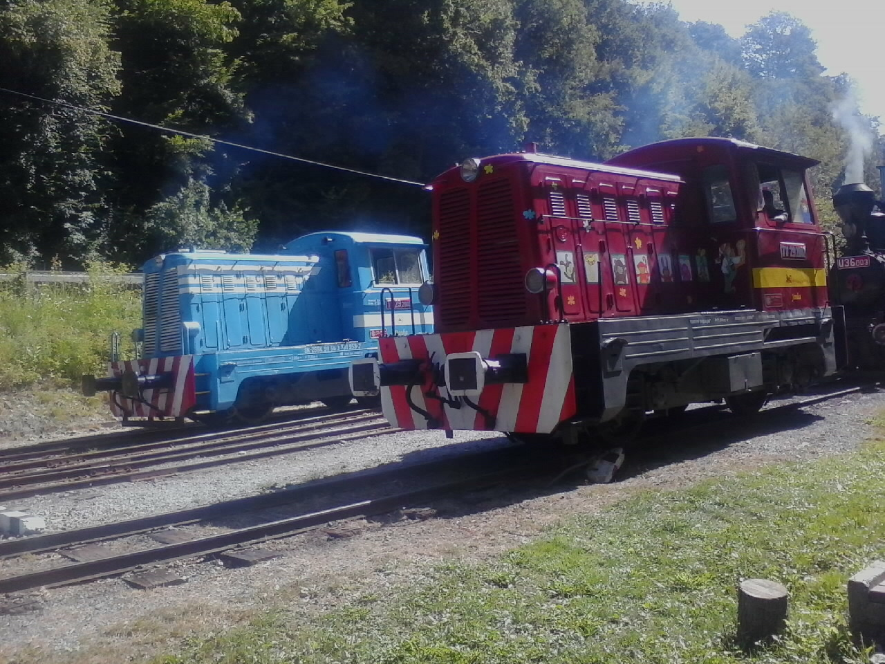 Motorové lokomotívy Danka a Janka počas posunu v stanici Čermeľ.